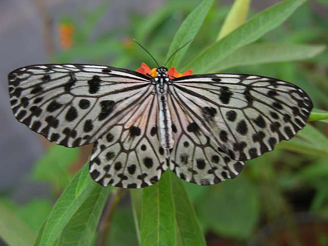 Idea malabarica butterfly adult